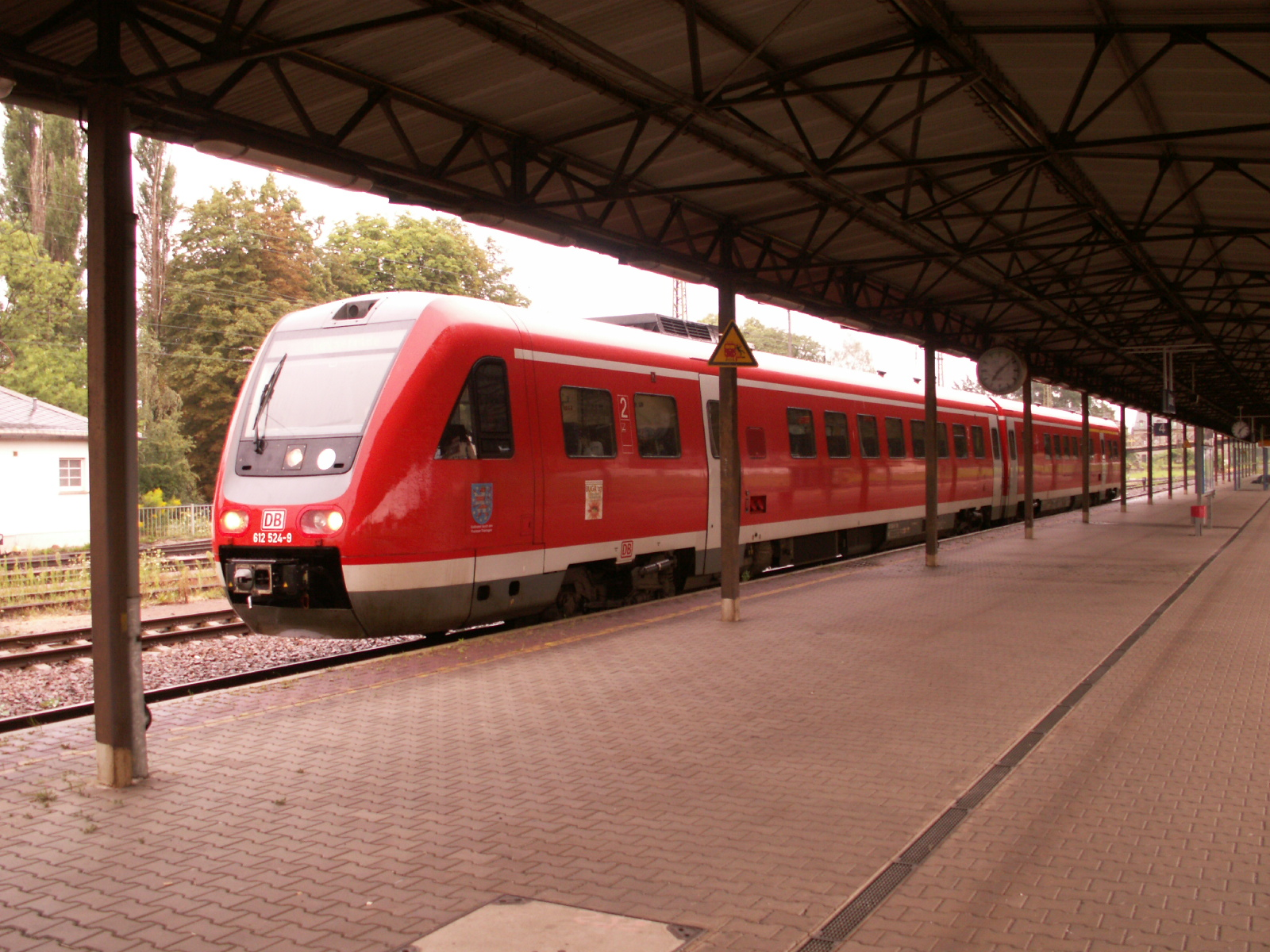 Bf Gößnitz